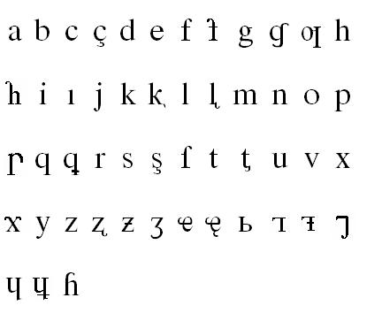 Abaza latin alphabet